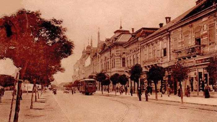 Tramvaiul electric din Satu Mare (1900-1906)